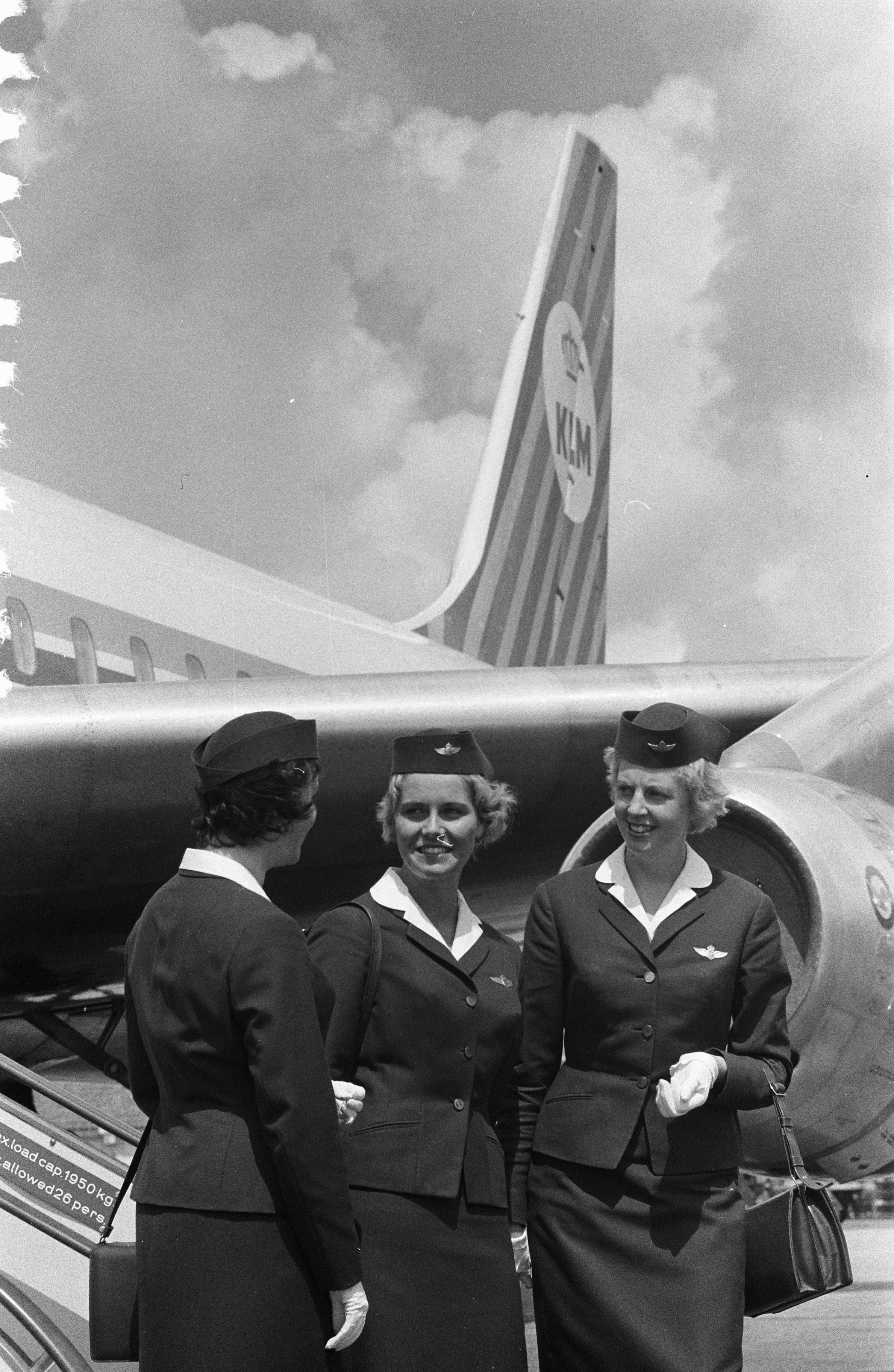 Collectie / Archief : Fotocollectie Anefo Reportage / Serie : [ onbekend ] Beschrijving : Nieuwe haarmode KLM stewardessen Datum : 14 juni 1960 Trefwoorden : HAARMODE, STEWARDESSEN Instellingsnaam : KLM Fotograaf : Pot, Harry / Anefo Auteursrechthebbende : Nationaal Archief Materiaalsoort : Negatief (zwart/wit) Nummer archiefinventaris : bekijk toegang 2.24.01.05 Bestanddeelnummer : 911-3376